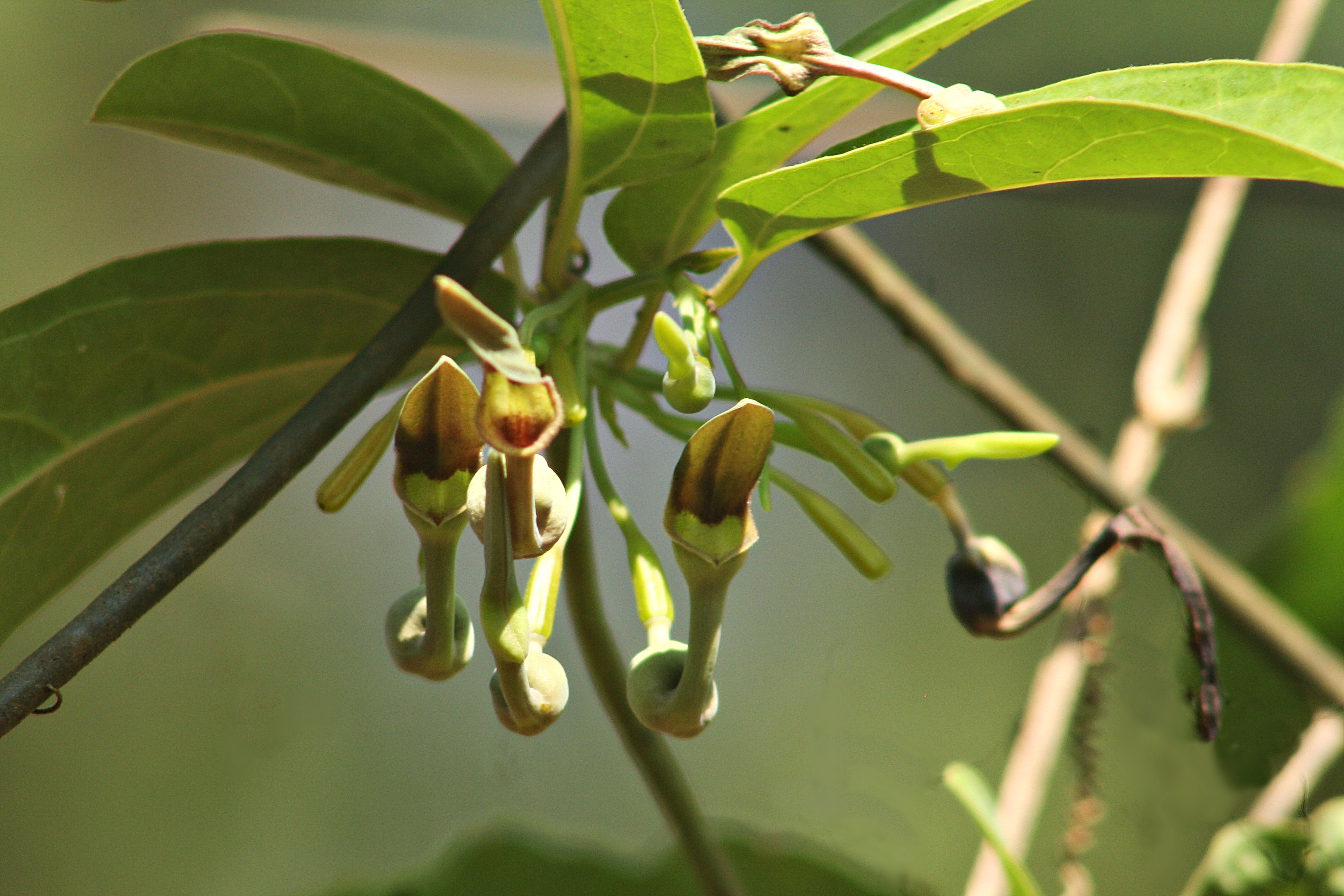 കടമ്പേരി, കണ്ണൂർ